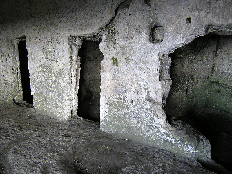 Mangup, Crimea